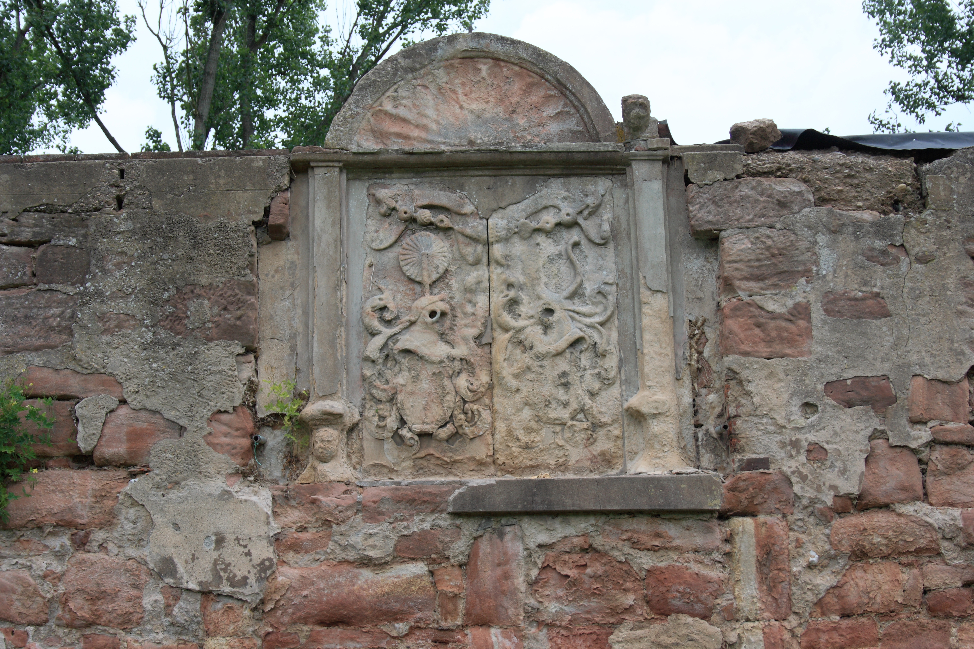 Wasserburg Aue in Aue, einem Ortsteil von Wanfried im Werra-Meißner-Kreis (Hessen), Stammsitz der Herren von Aue, nach 1435 im Besitz der Herren von Eschwege, Wappen